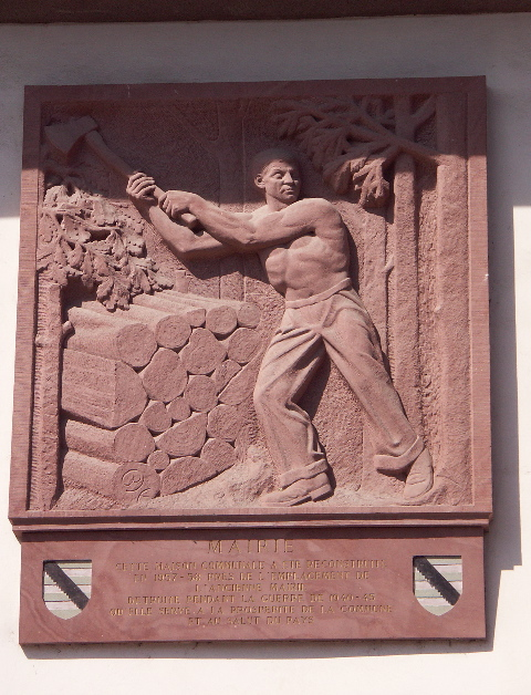 Blason de Lembach et bas-relief pour un hommage aux bûcherons et aux charbonniers. (Mur de la Mairie)